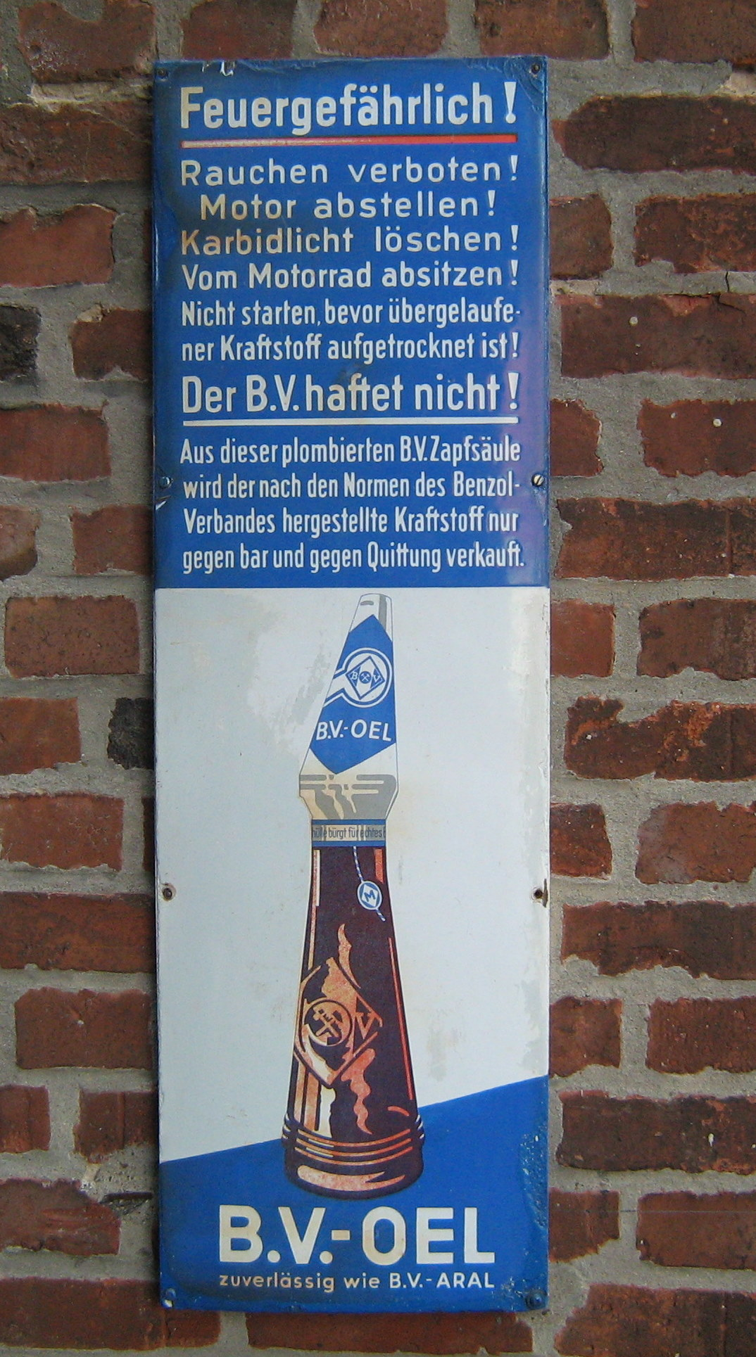 alte Aral Feuer-Hinweis Tafel